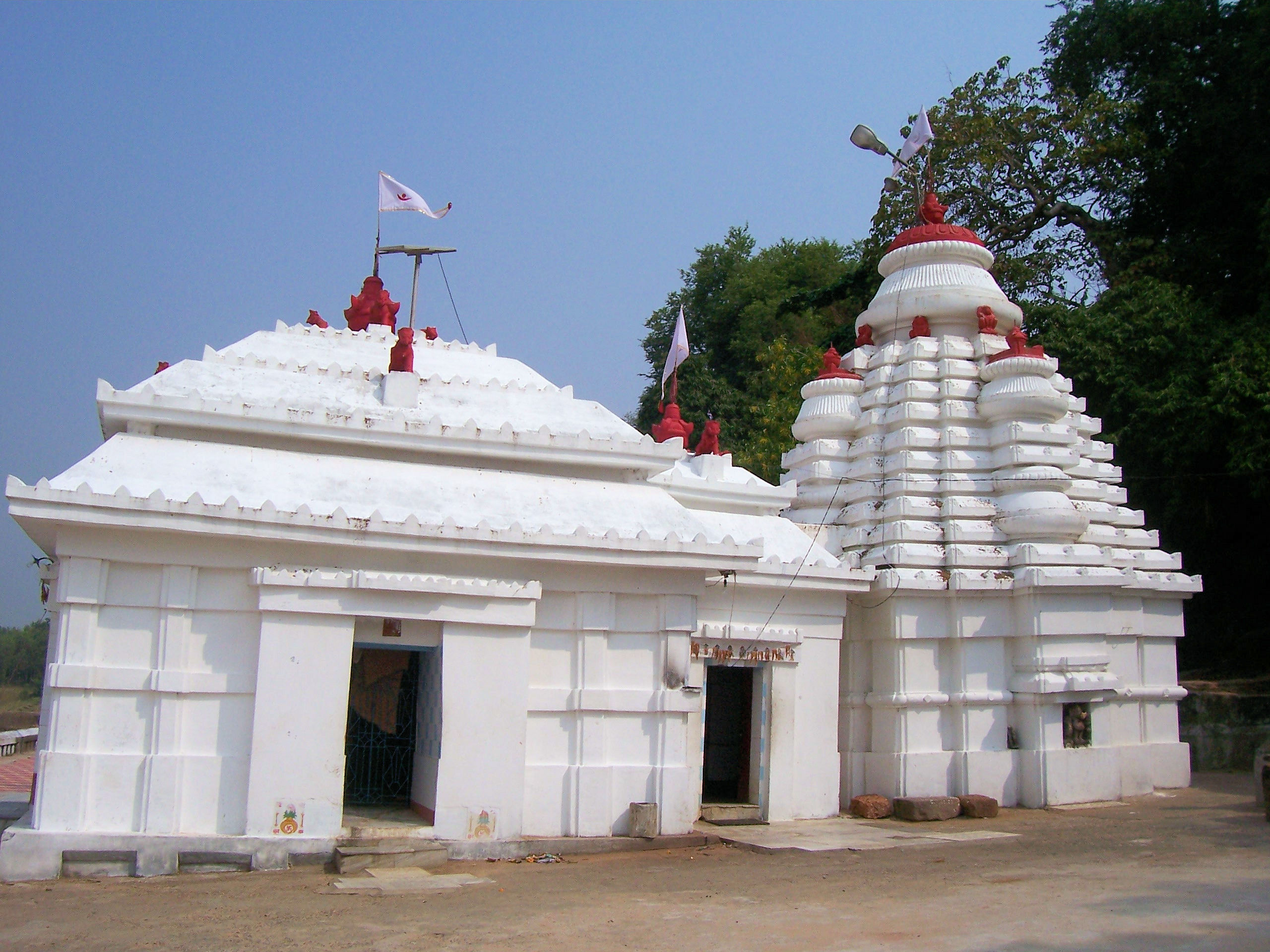 Bhattarika Temple, Orissa